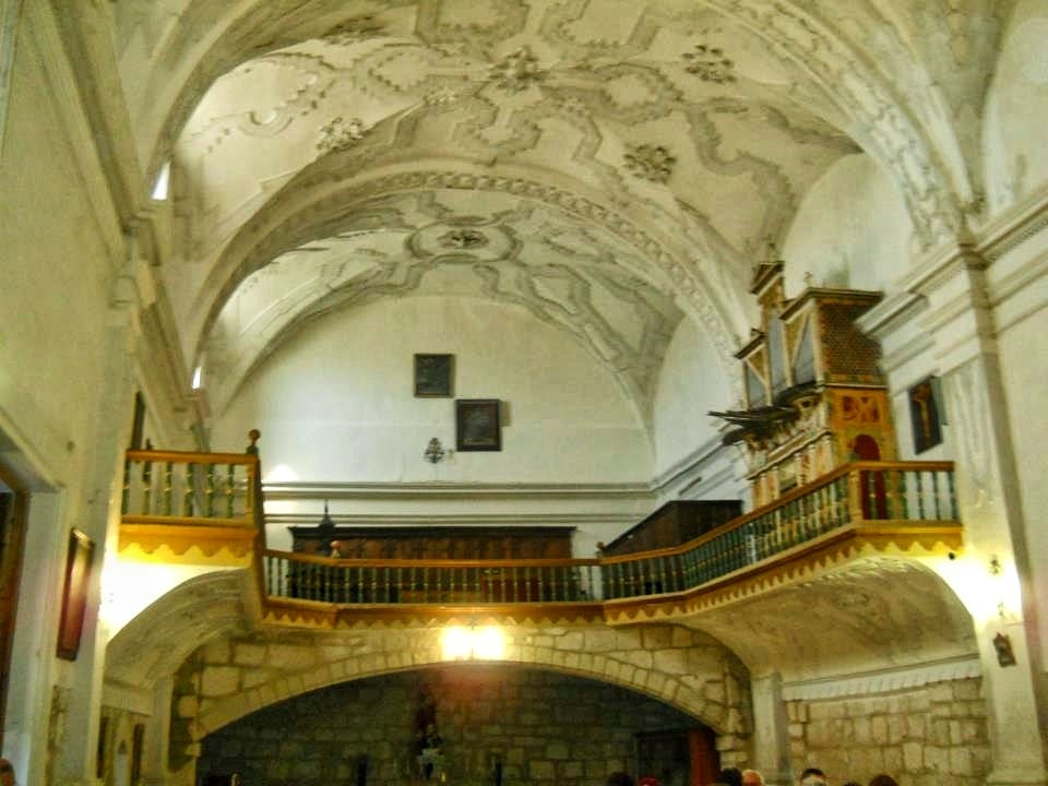 Interior de la Ermita de Revilla